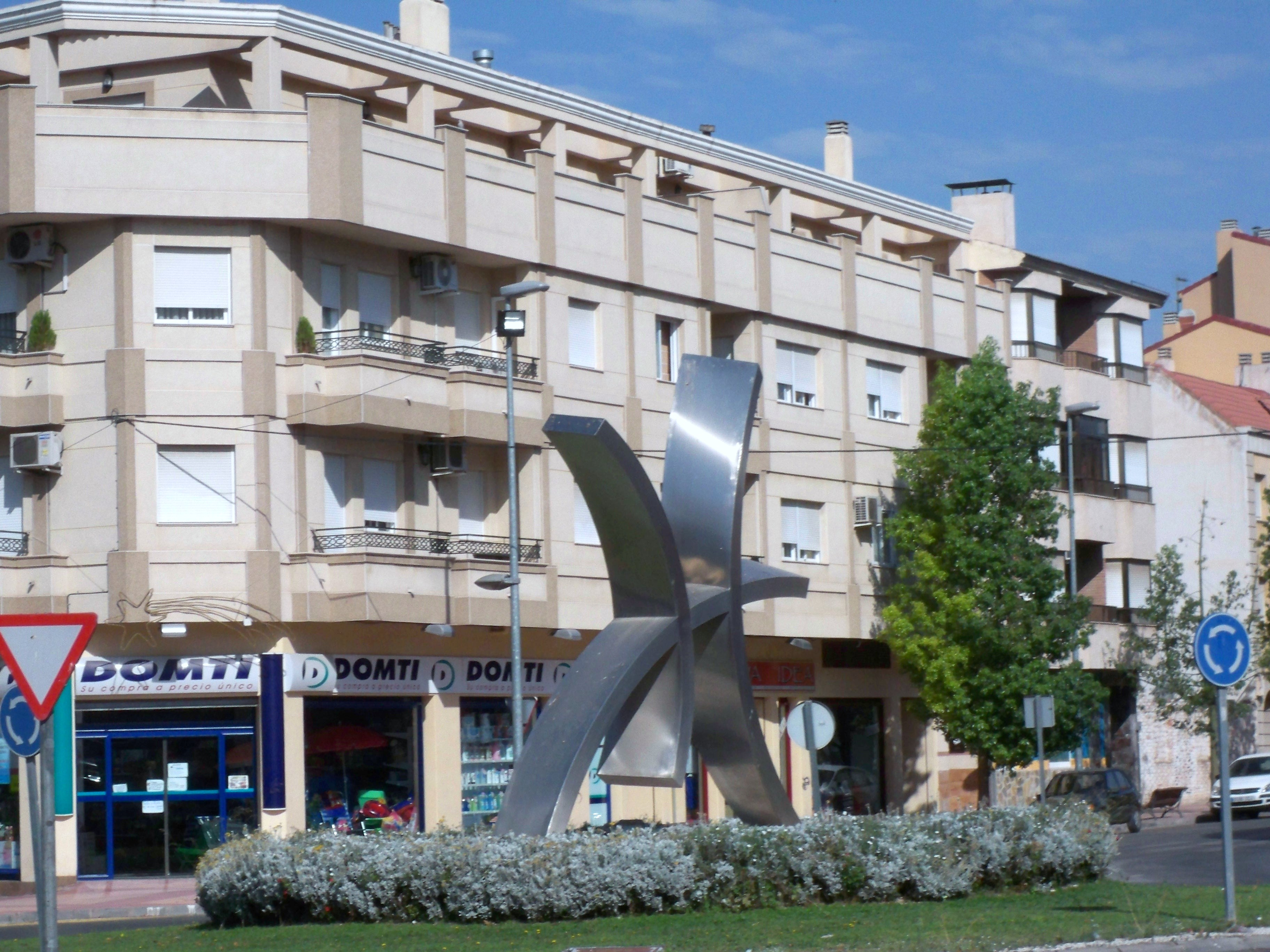 Monolito situado en una rotonda en la ciudad de Hellín (Albacete-España)